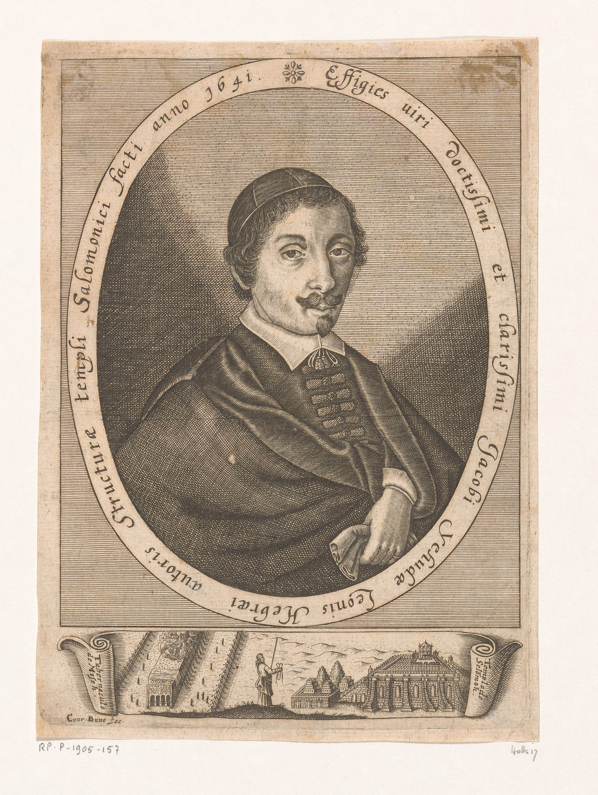 IdentificatieTitel(s): Portret van Jacob Jehuda LeonObjecttype: prent Objectnummer: RP-P-1905-157Catalogusreferentie: Hollstein German V.25-17Opmerking: Geen staten vermeld.Collectie Rijksmuseum-1 of 2(2)Opschriften / Merken: verzamelaarsmerk, verso, gestempeld: Lugt 2228VervaardigingVervaardiger: prentmaker: Conrad Buno (vermeld op object)Plaats vervaardiging: BraunschweigDatering: 1641Materiaal: papier Techniek: etsen / graveren (drukprocedé)Afmetingen: plaatrand: h 181 mm × b 133 mmOnderwerpWat: historical personsunderclothes and nightwearWaar: TempelbergWie: Jacob Jehuda LeonVerwerving en rechtenCredit line: Schenking van de heer C. ScheiblerVerwerving: schenking 1905Copyright: Publiek domein